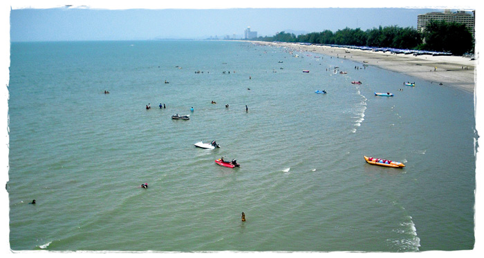 ปึกเตียน